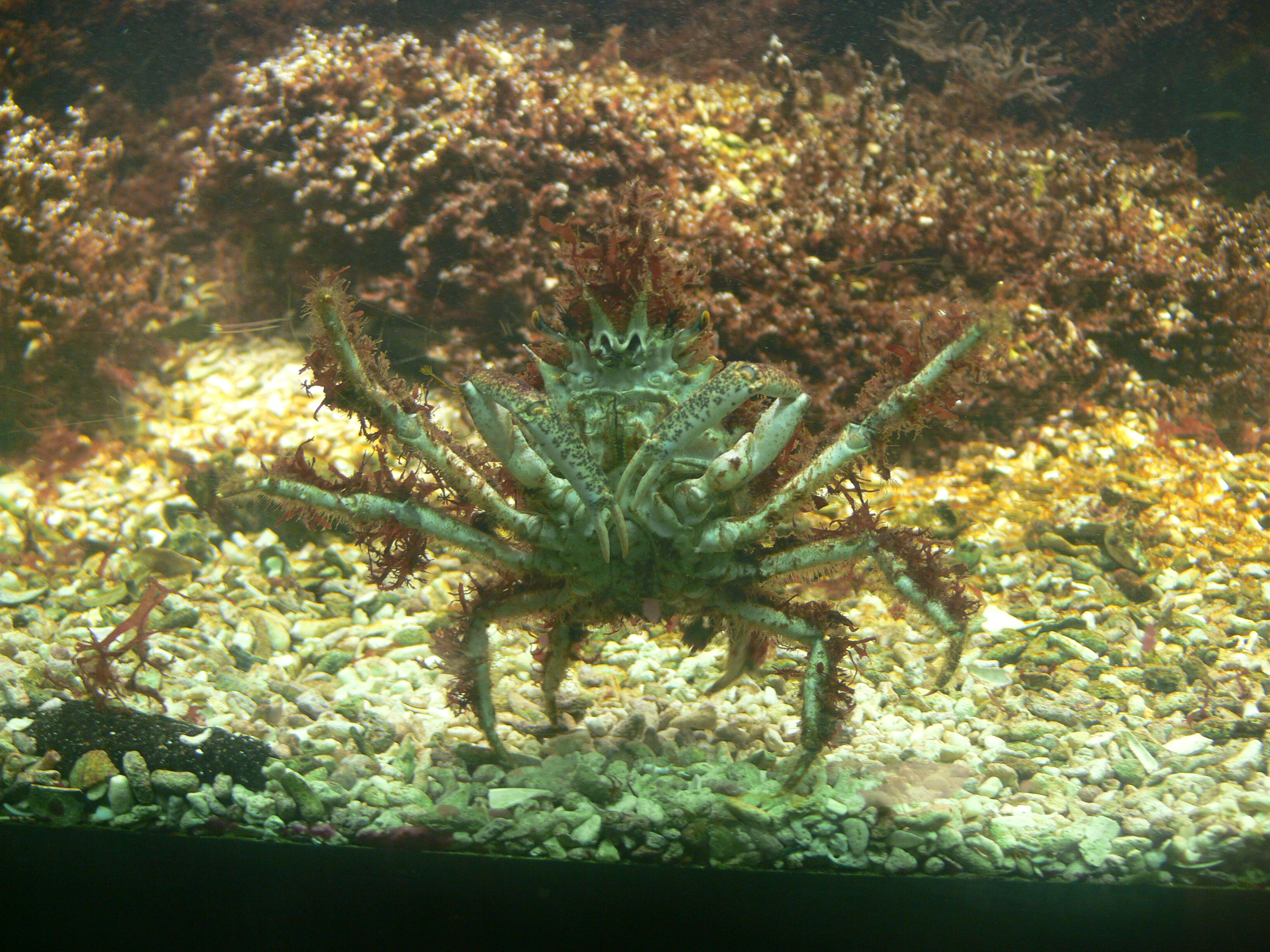 Crabe dans l'aquarium du Museum d'histoire naturelle, à Venise